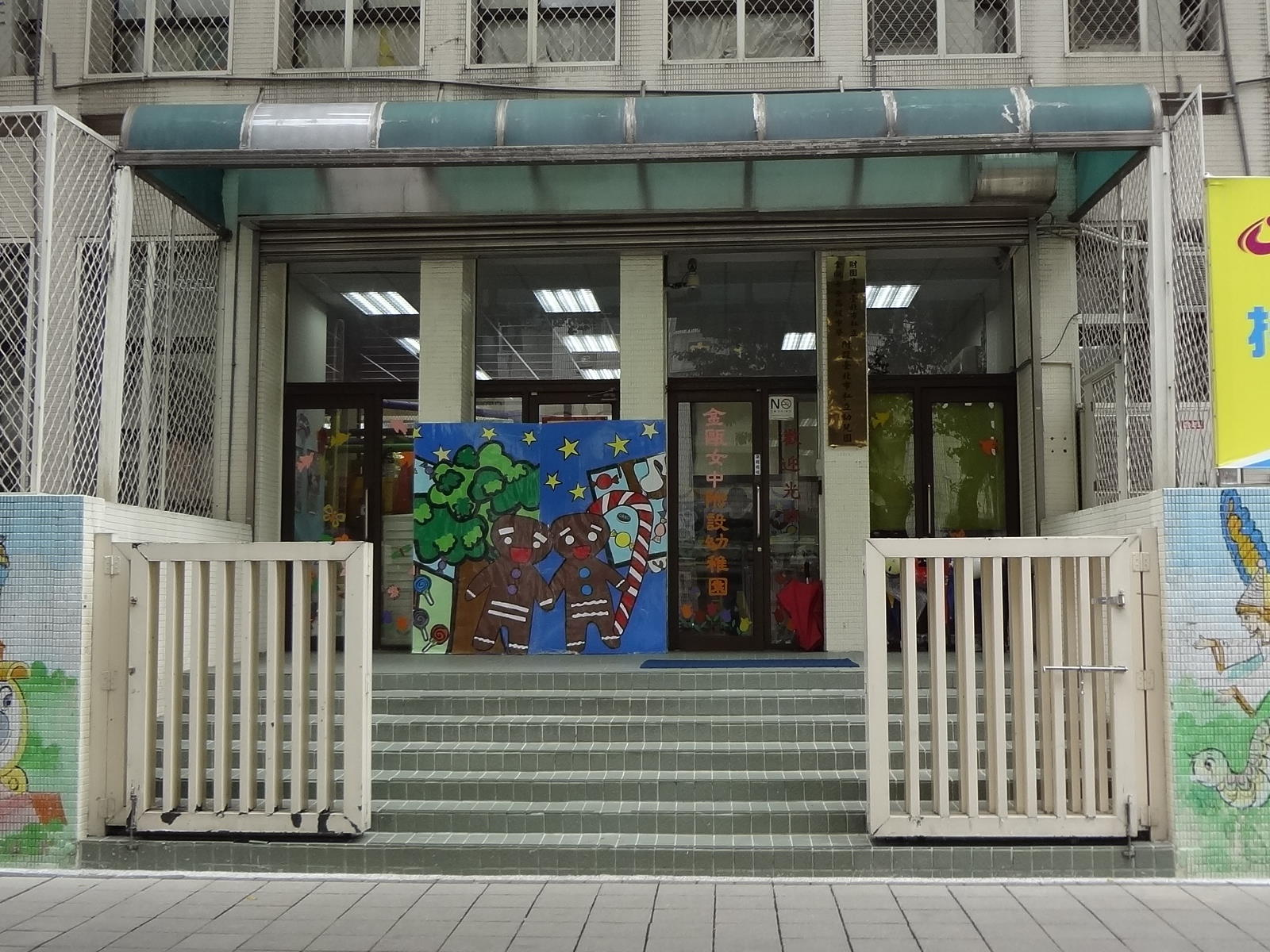 臺北市私立金甌女子高級中學附設幼兒園，地址與金甌女中同樣是臺北市大安區杭州南路二段1號，大門面對信義路二段。